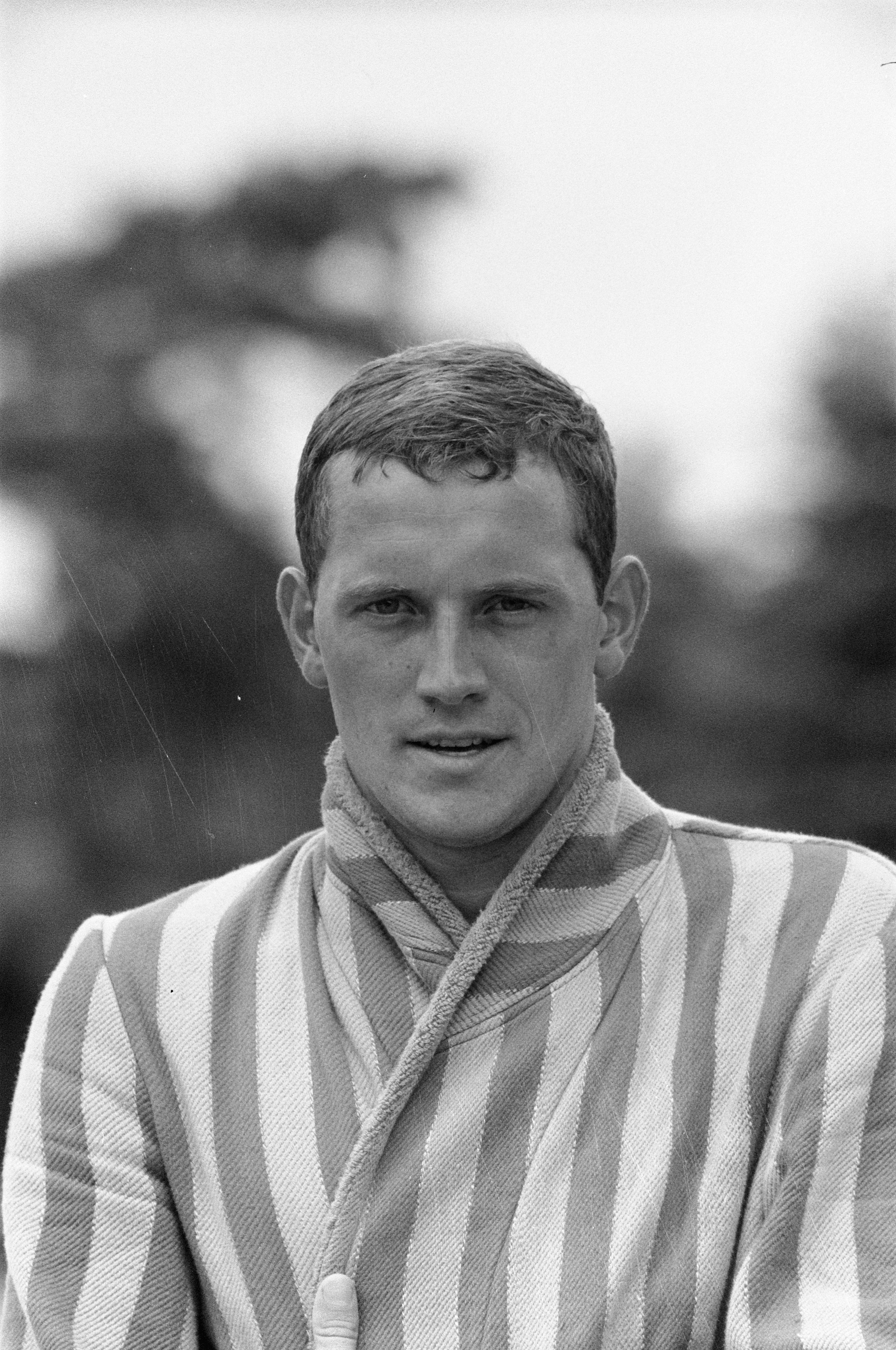 Collectie / Archief : Fotocollectie Anefo Reportage / Serie : [ onbekend ] Beschrijving : Nederlandse zwemkampioenschappen te Apeldoorn, beeldnr. 2 3 Gerrit Korteweg , beeldnr. 4 en 5 Thea Dupon Datum : 7 augustus 1960 Locatie : Apeldoorn, Gelderland Trefwoorden : zwemkampioenschappen Persoonsnaam : Gerrit Korteweg Fotograaf : Pot, Harry / Anefo Auteursrechthebbende : Nationaal Archief Materiaalsoort : Negatief (zwart/wit) Nummer archiefinventaris : bekijk toegang 2.24.01.05 Bestanddeelnummer : 911-4841